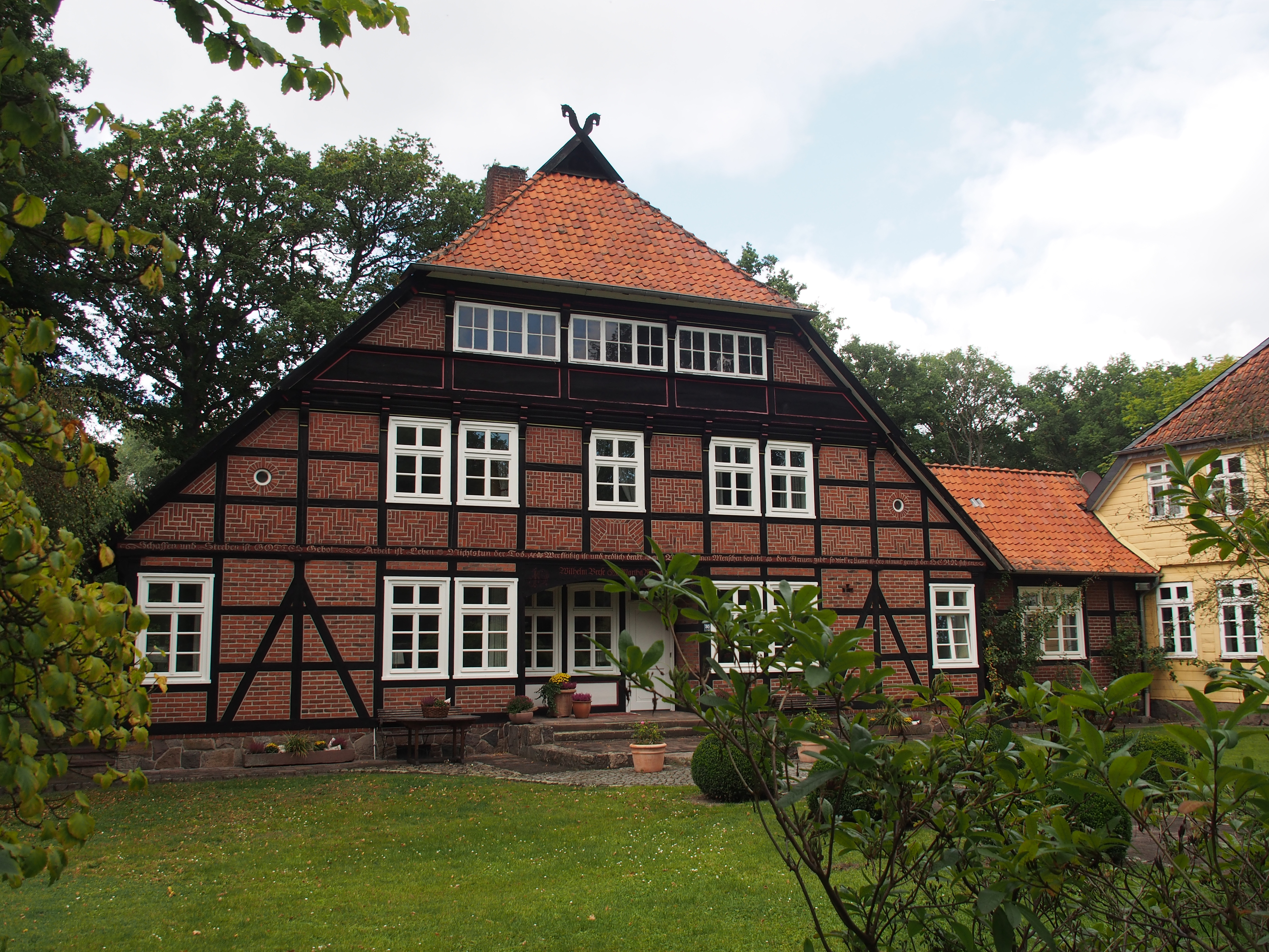 Bauernhof ehemals Wilhelm Marwede, Endeholzer Str. 30, Ortsteil Marwede, Dorf Scharnhorst, Gemeinde Eschede (Niedersachsen)